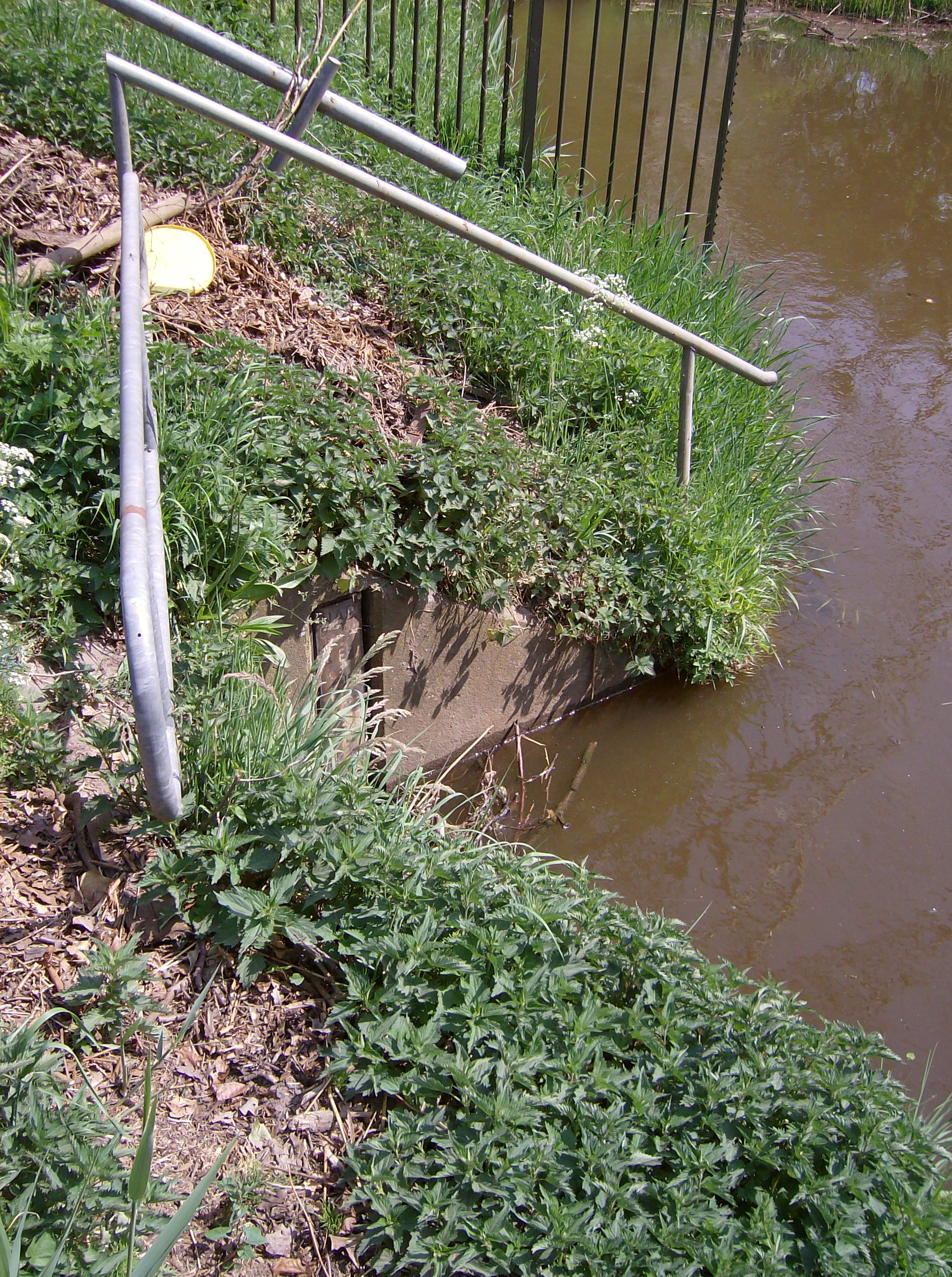 Onder geleide twentekanaal bij Delden